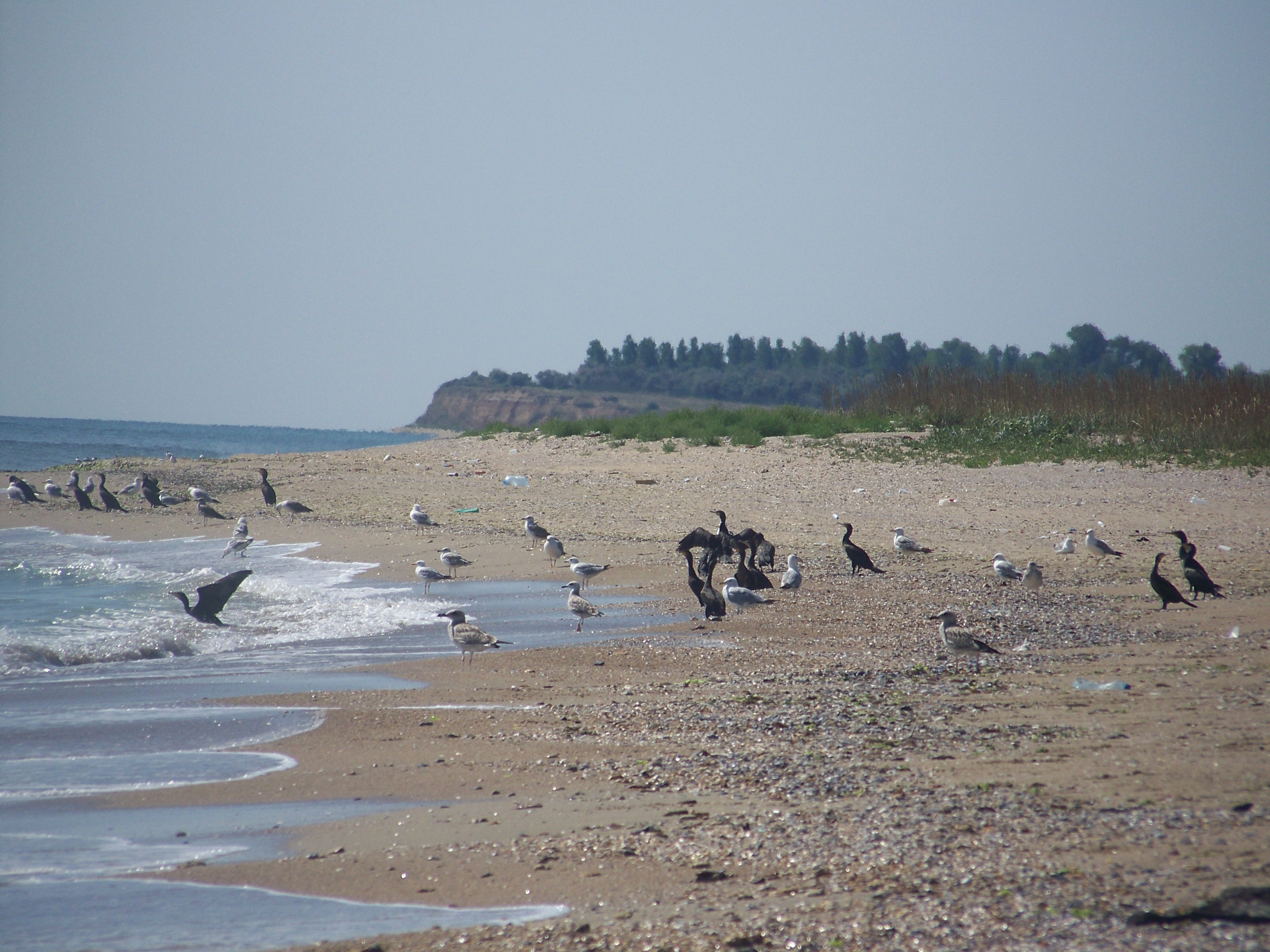 Paysage sauvage à Shabla en Bulgarie, au bord de la mer noire, près de la frontière avec la Roumanie.